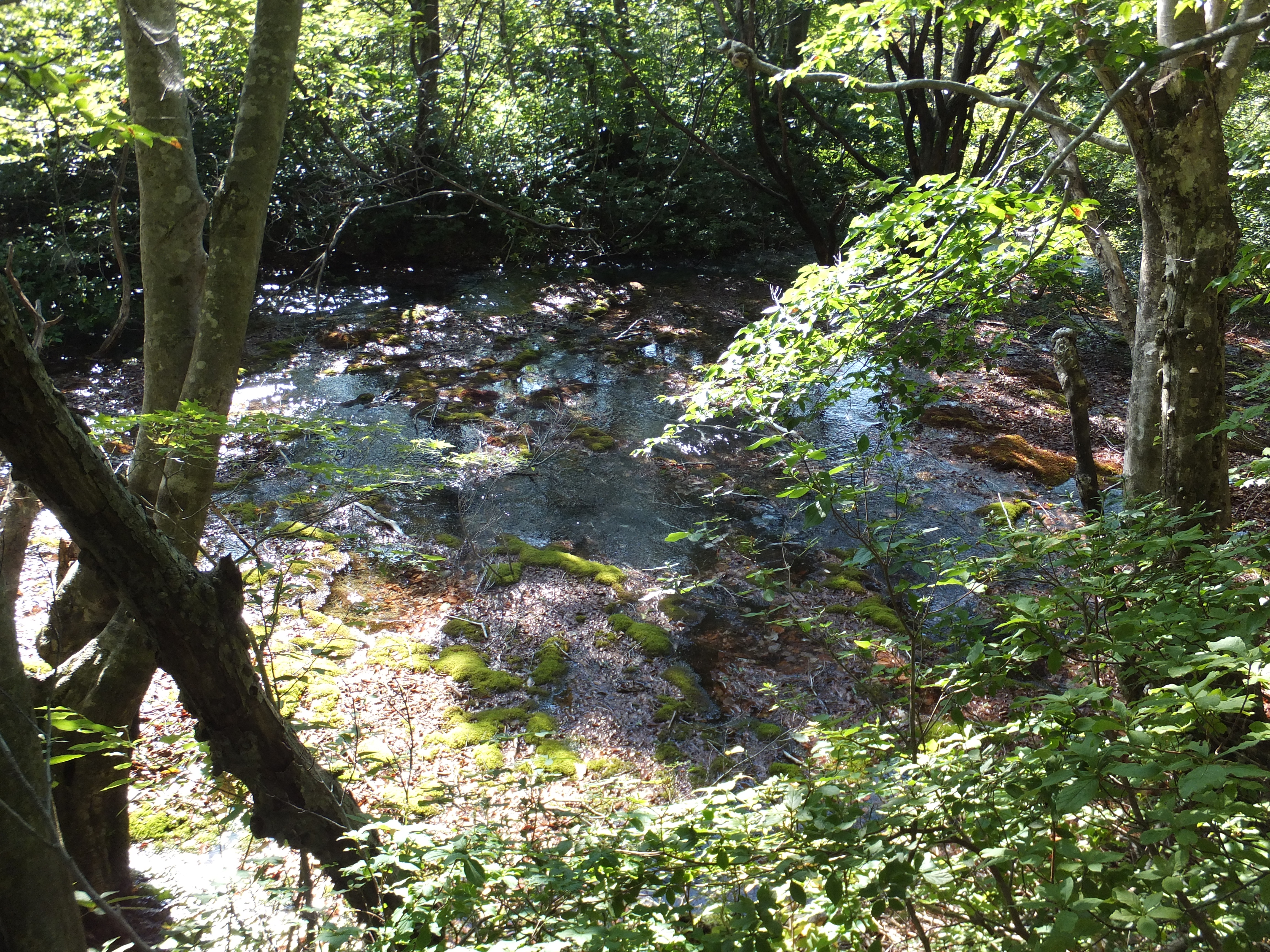 にかほ市の獅子ヶ鼻湿原。鳥海マリモの群生地として知られる。